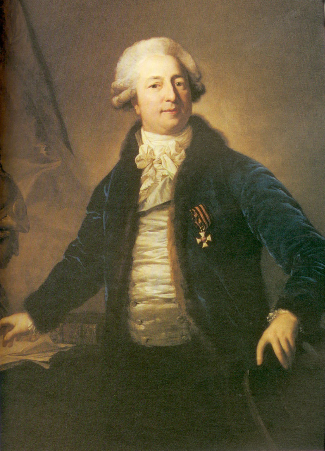 Адриан Иванович Дивов (1749-1814), сын московского генерал-полицмейстера; сенатор, тайный советник. Был женат на графине Елизавете Ивановне Бутурлиной (1762-1813).